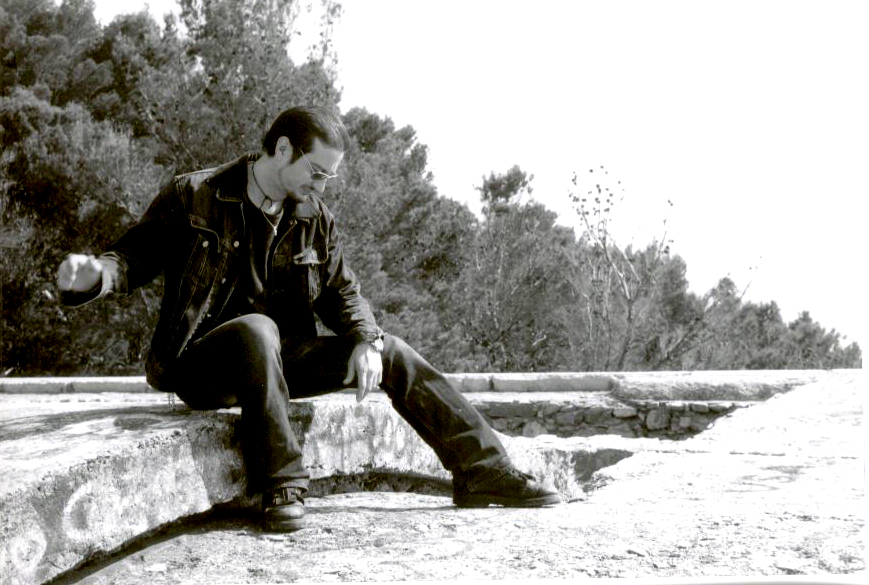 Jerico in un momento di pausa durante una registrazione al Vallemania Recording Studios (AN)